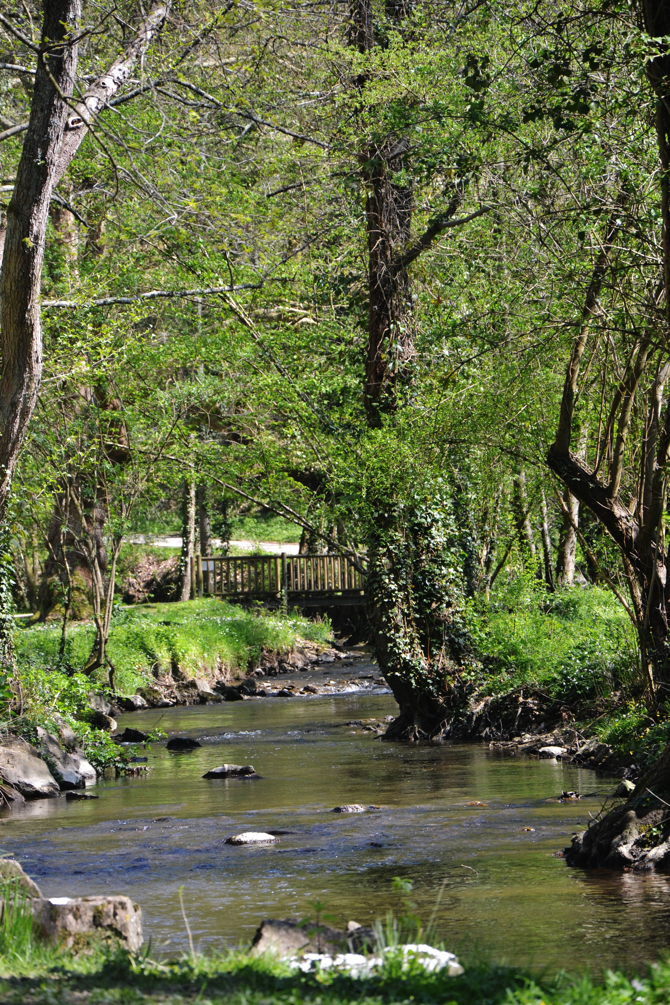 L'Auzette dans le parc du Mas-Rome à Limoges (Haute-Vienne, France)